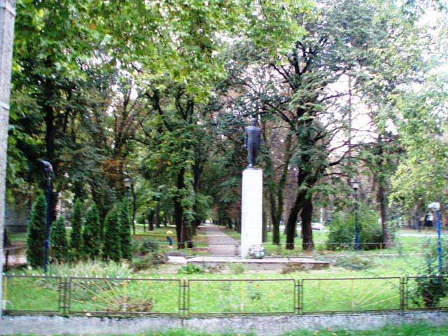 Spomenik u centru